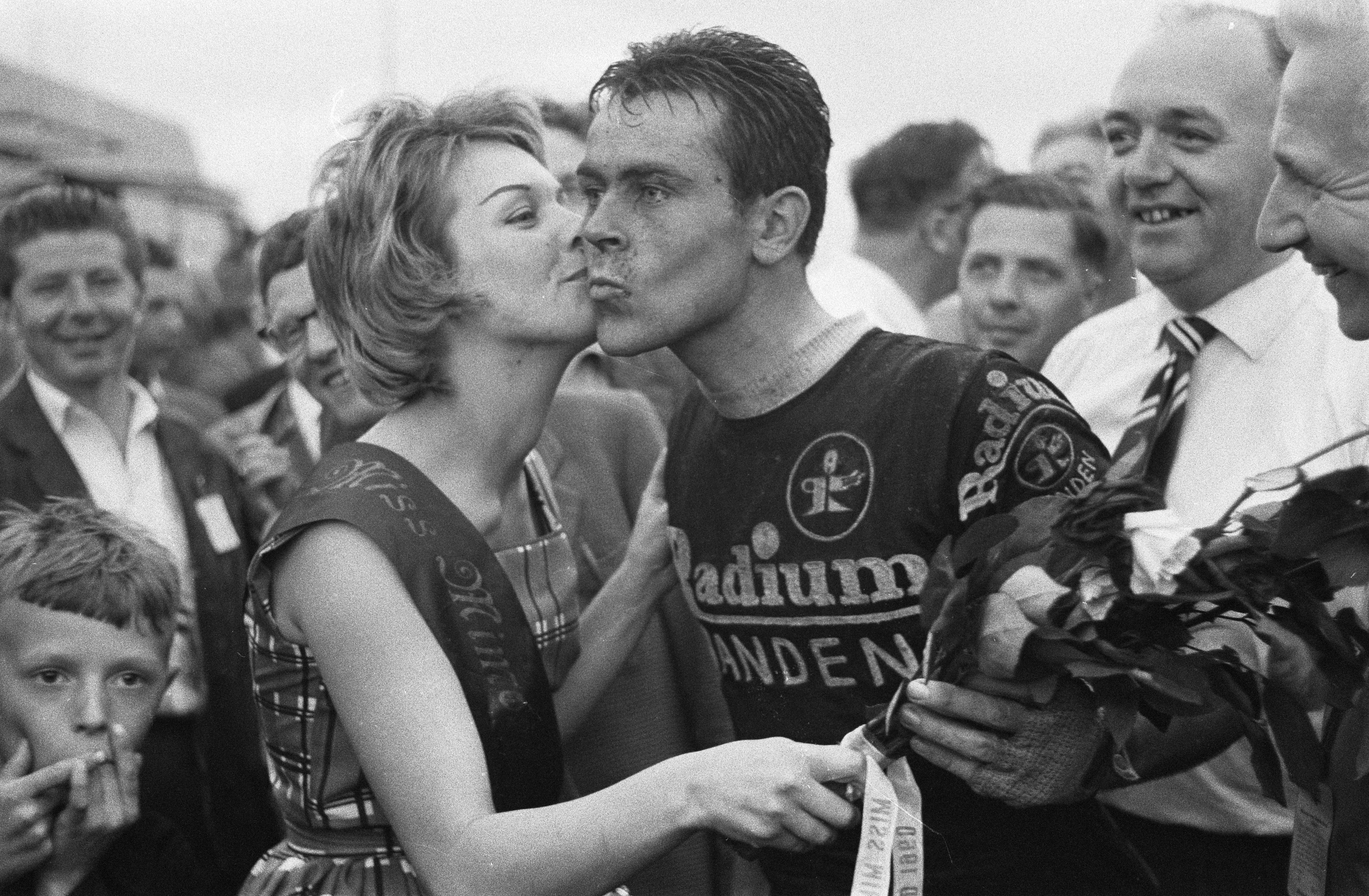 Collectie / Archief : Fotocollectie Anefo Reportage / Serie : [ onbekend ] Beschrijving : Vierde etappe in de Ronde van Nederland. Finish te Sittard. Winnaar Jo de Roo wordt gefeliciteerd door de Rondemiss Datum : 13 mei 1960 Locatie : Limburg, Sittard Trefwoorden : wielrennen Persoonsnaam : Roo, Jo de Fotograaf : Pot, Harry / Anefo Auteursrechthebbende : Nationaal Archief Materiaalsoort : Negatief (zwart/wit) Nummer archiefinventaris : bekijk toegang 2.24.01.05 Bestanddeelnummer : 911-2544